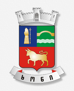 ხონის მუნიციპალიტეტის გერბი